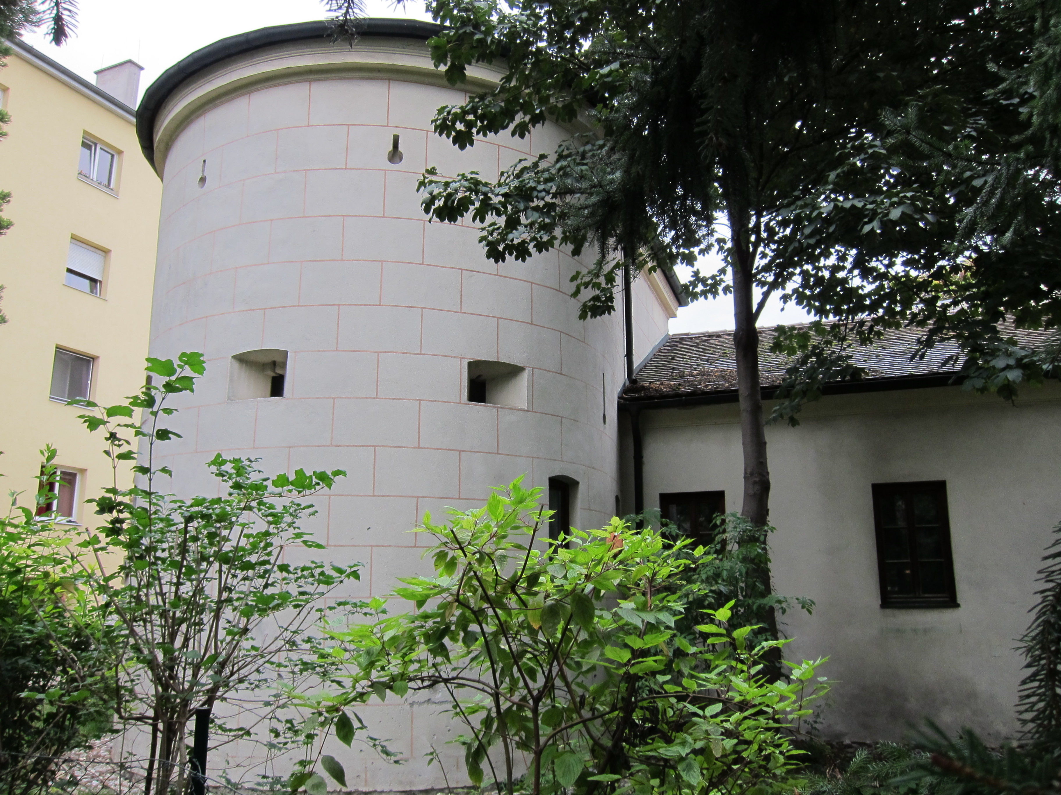 Turm der Stadtbefestigung und Reste der Stadtmauer